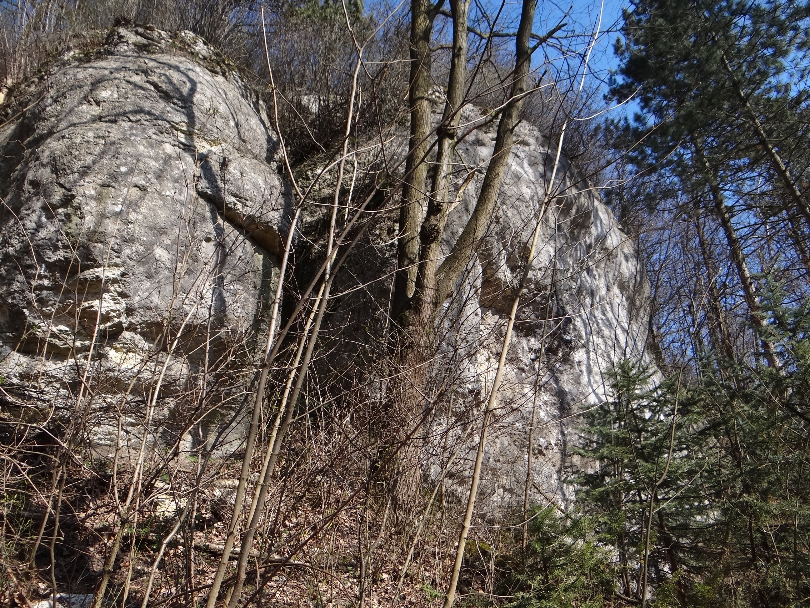 Skała Krzyżakowa w Dolinie Brzoskwinki (część prywatna)